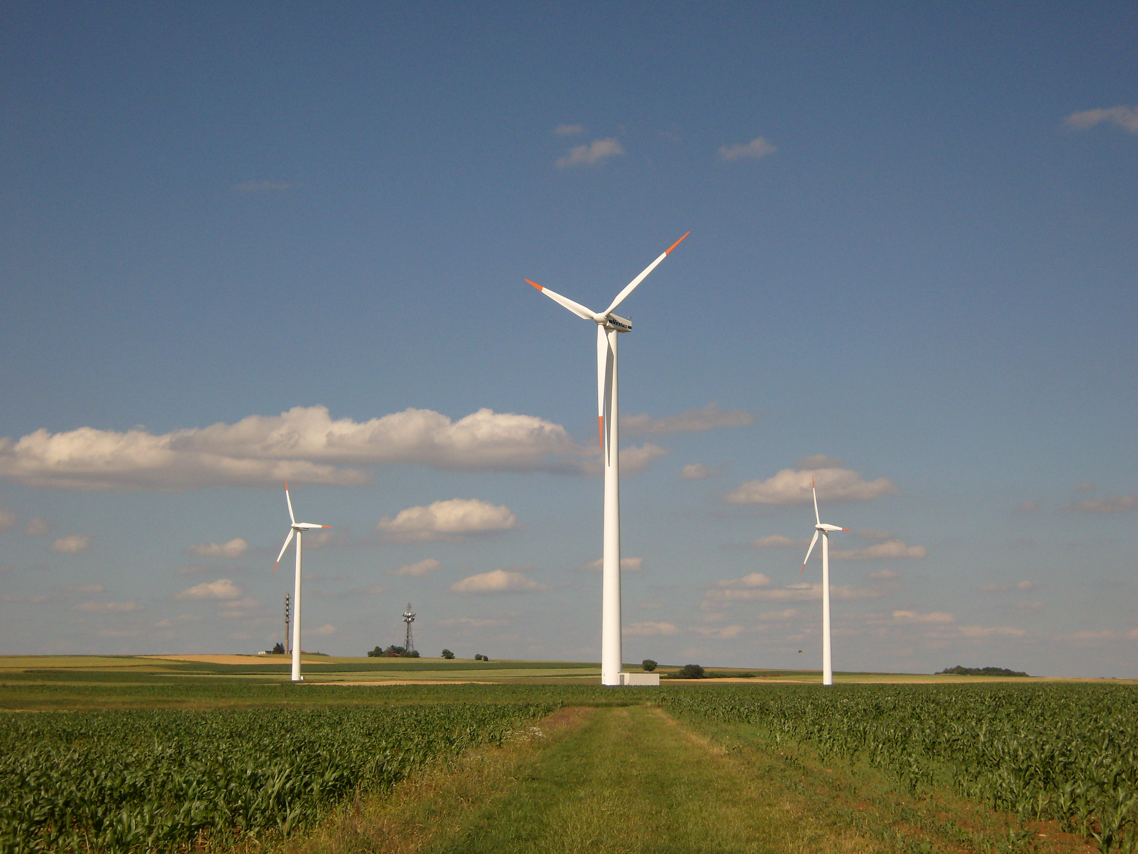 3 Windräder